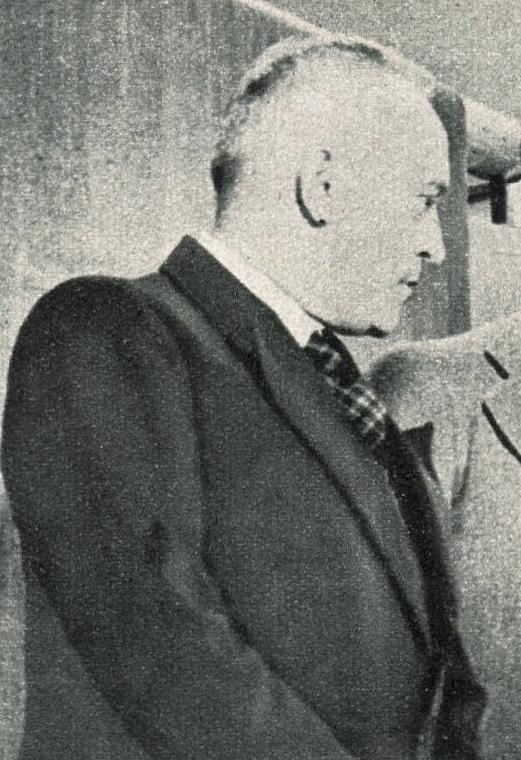 Gabriel Hanot en novembre 1938.